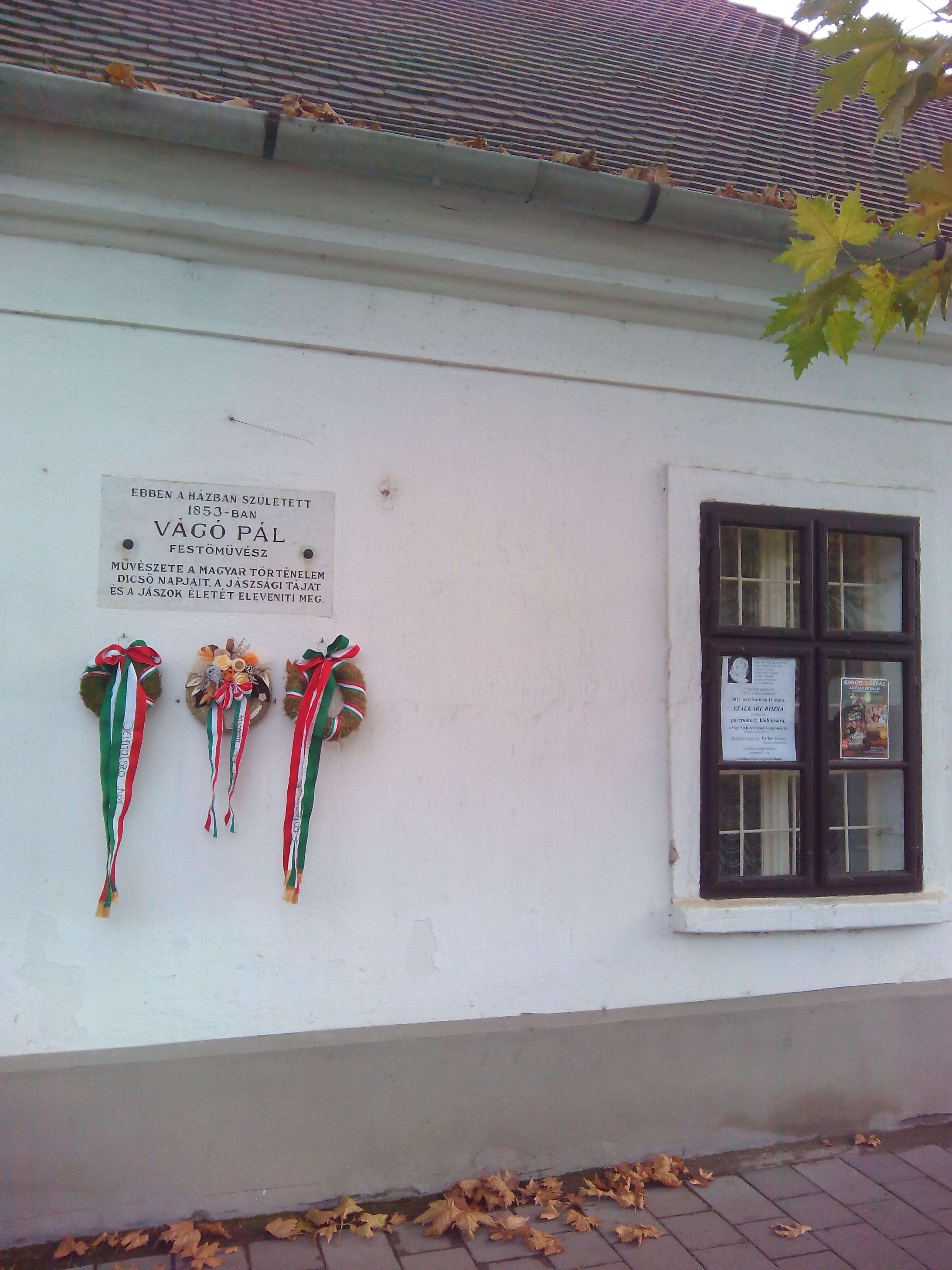 Vágó Pál szülőháza, 1803-ban épült, a Vágó Pál Helytörténeti Gyűjtemény [1] azonosító: -2003 This is a photo of a monument in Hungary. Identifier: -2003